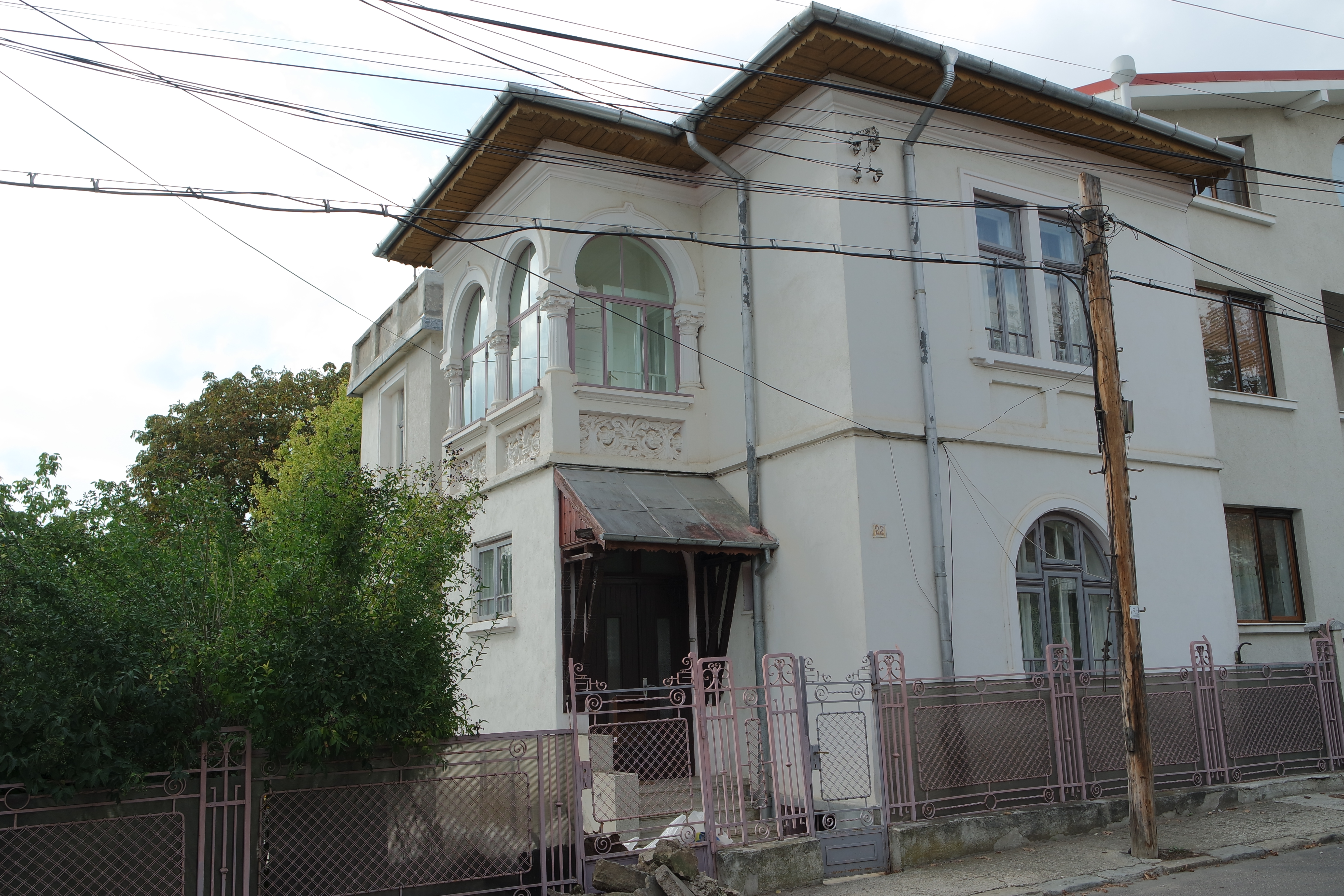 Casă - Iași, Str.Sf.Atanasie Nr.22